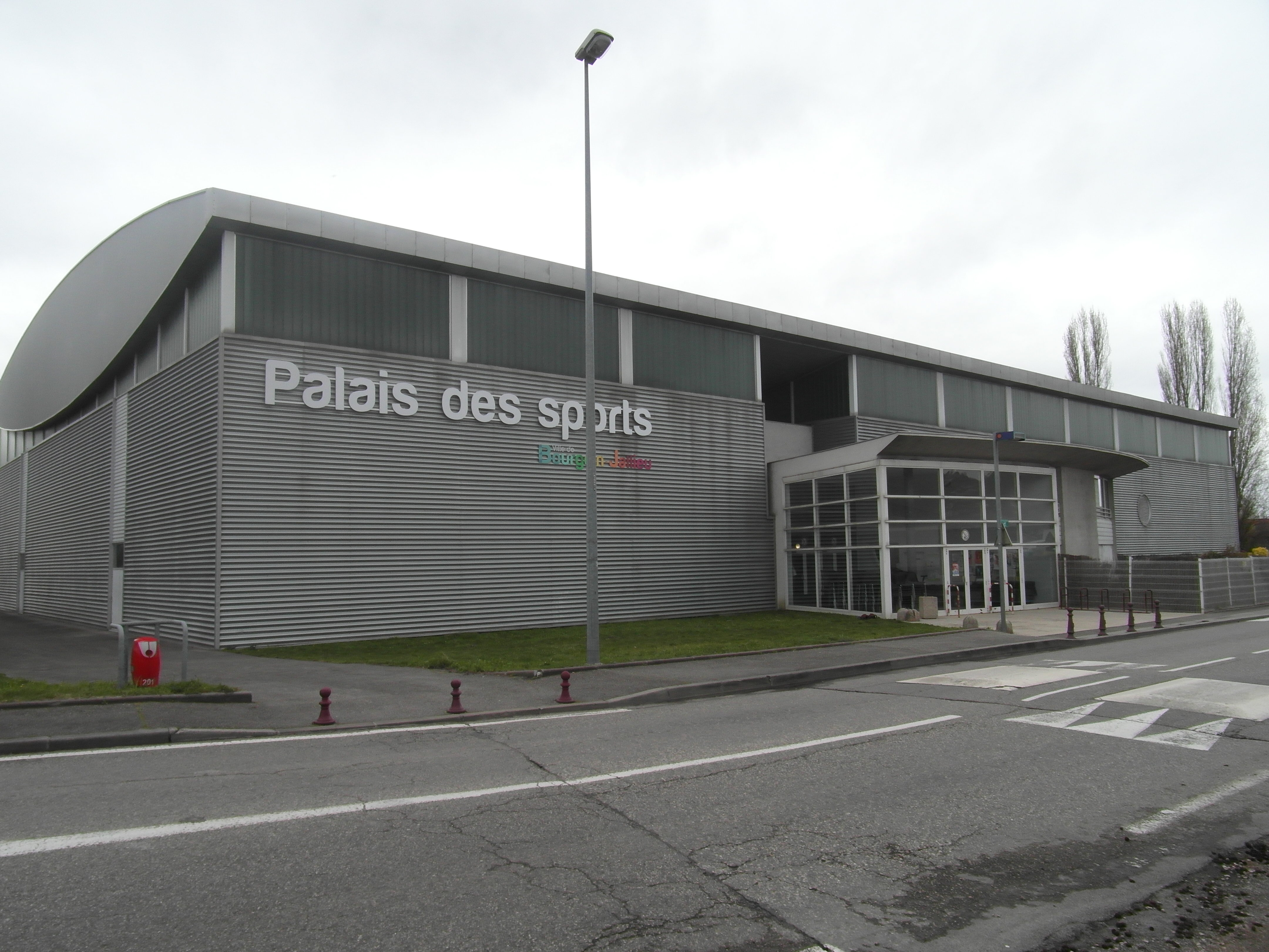 Salle omnisport de Bourgoin-Jallieu